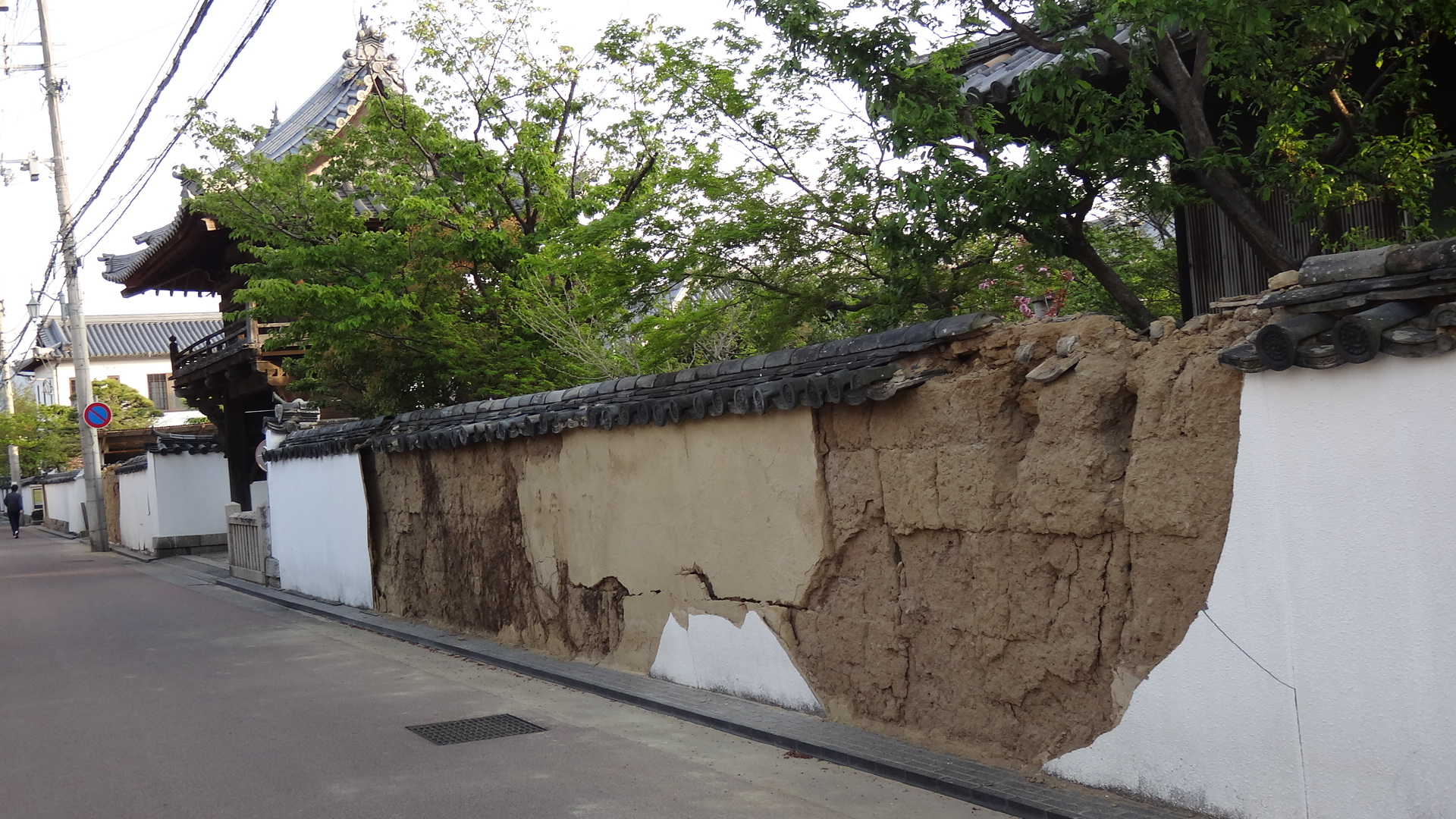 2013年4月の淡路島地震により壊れた塀（洲本市・千福寺）